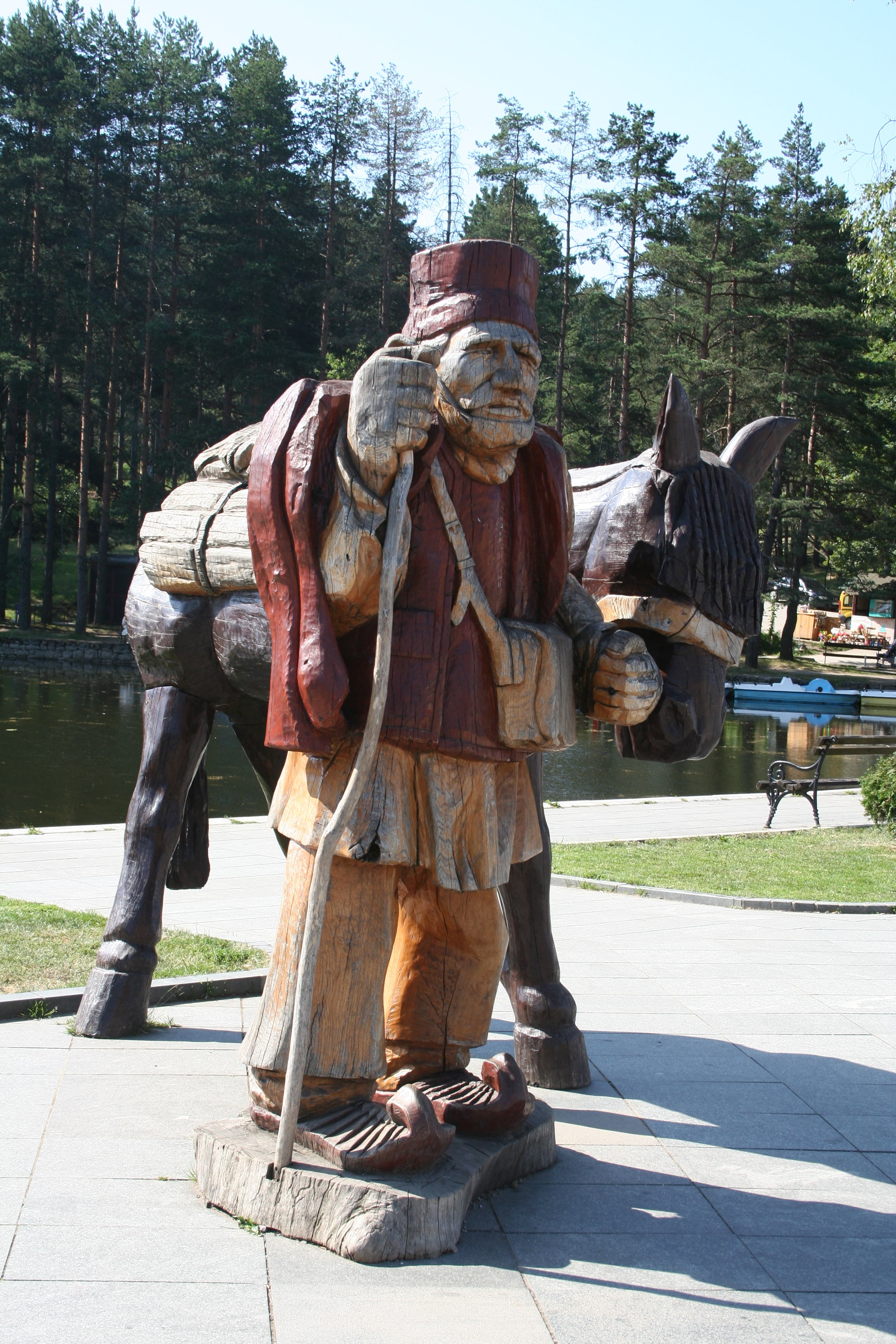 Zlatibor